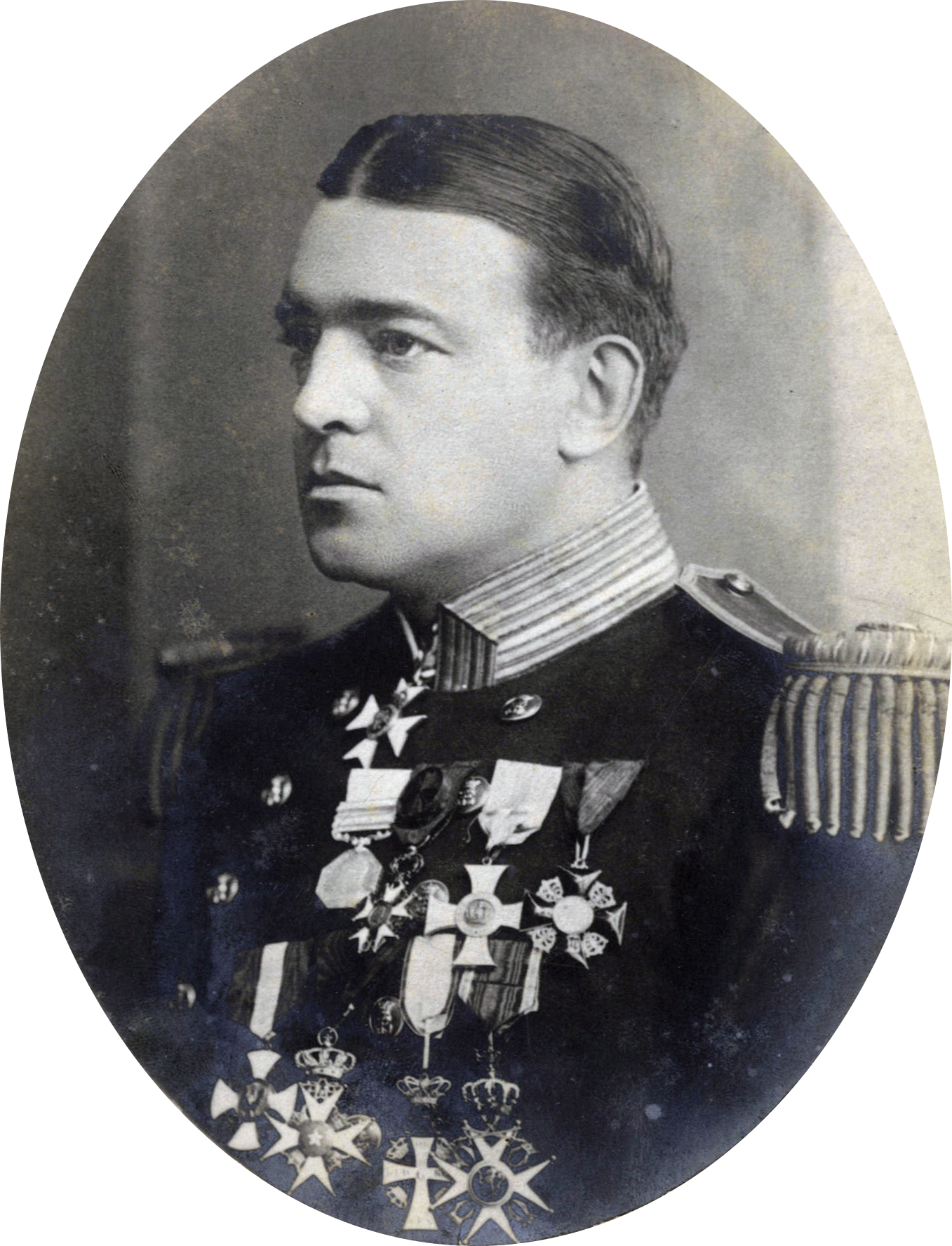 Ernest Shackleton in uniform